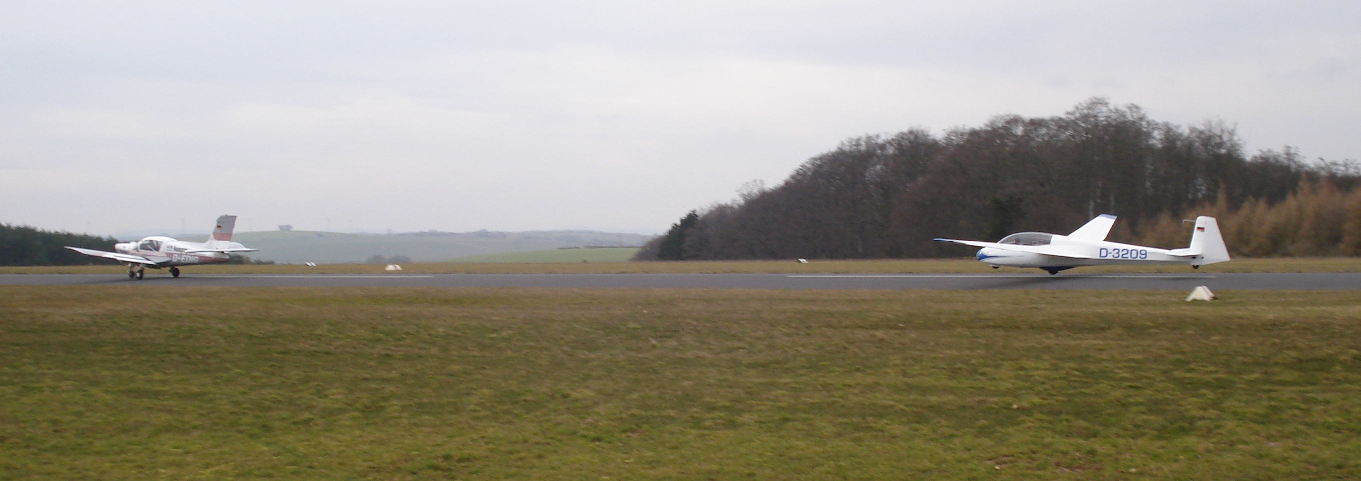 Start eines Schleppzuges auf dem Flugplatz Günterode/Heiligenstadt bestehend aus einer Morane-Saulnier M.S.880 und ASK 13